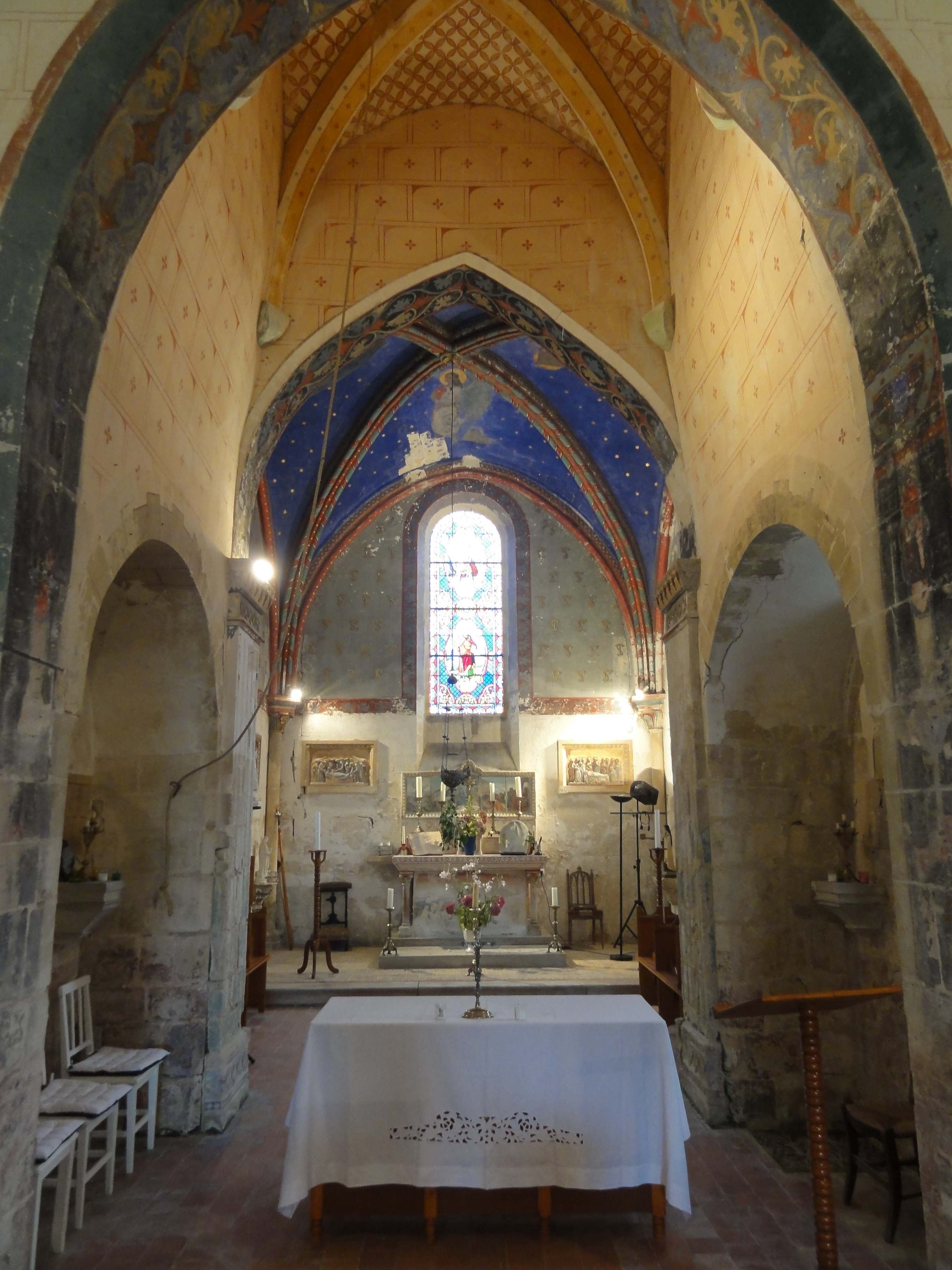 Intérieur de la chapelle - voir titre.